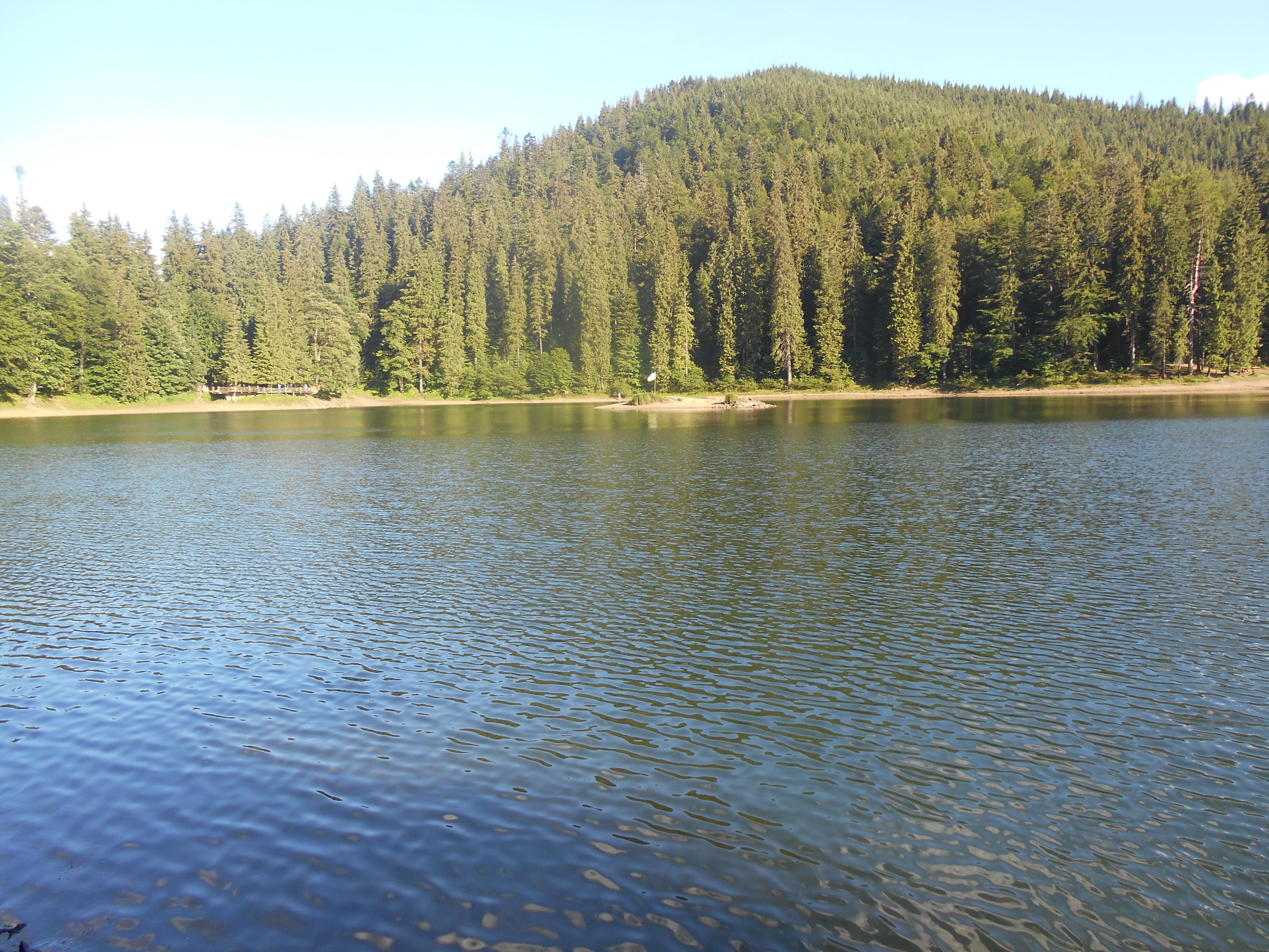 НПП** «Синевир», Міжгірський, Хустський райони